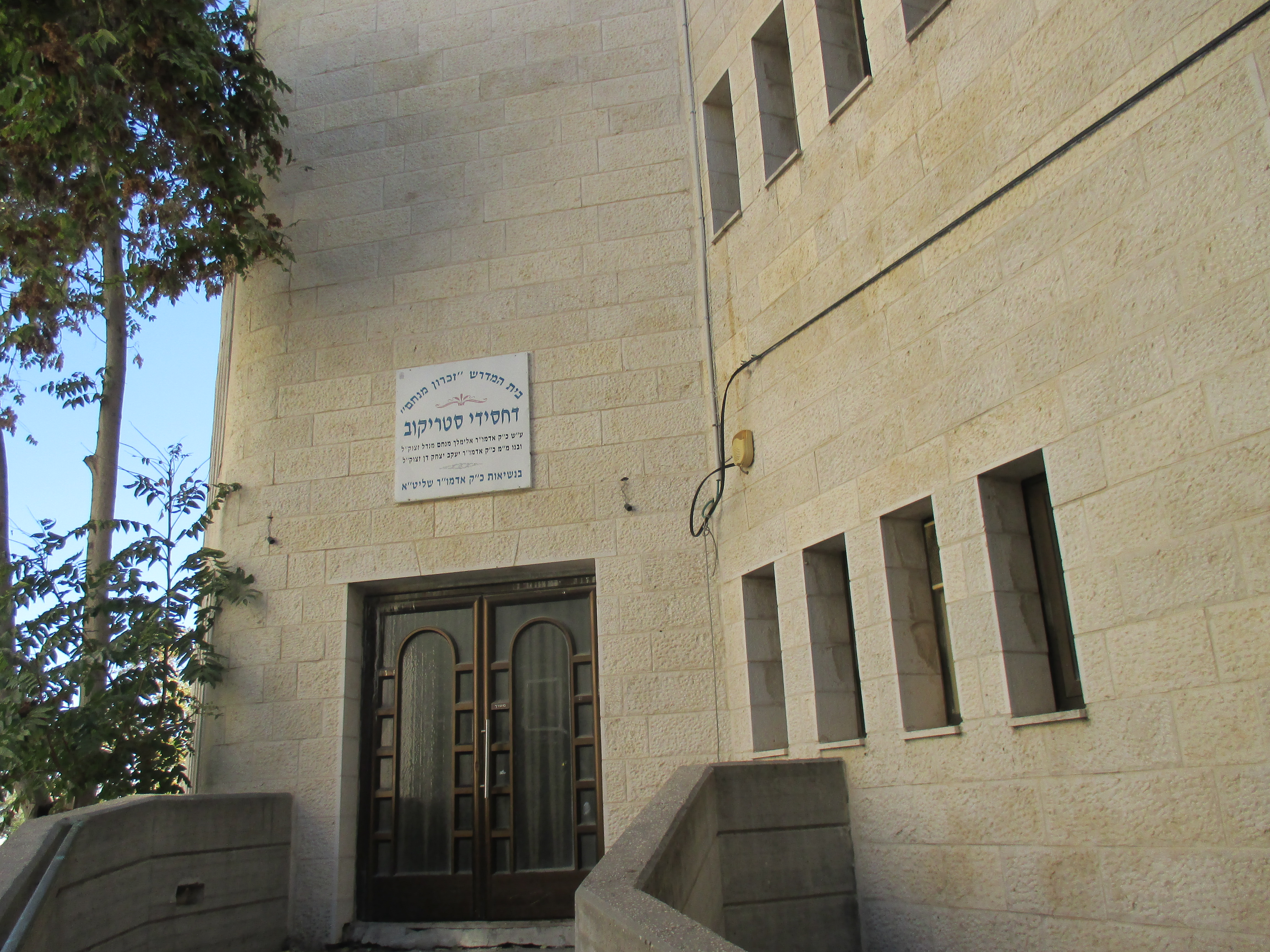 בית המדרש סטריקוב בירושלים